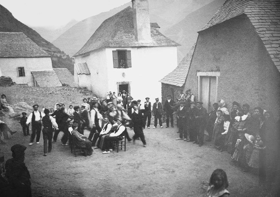 Imatge